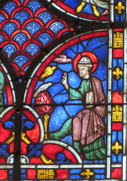 Vitrail du XIIIe siècle et médaillon de Saint Blaise et les oiseaux. L'intérêt du vitrail réside dans ses bordures, «les fleurs de lys (or sur fond bleu pour le roi saint Louis) alternent avec les tours de Castille (or sur fond rouge, pour sa mère Blanche de Castille). C'est le signe que le vitrail a été offert par saint Louis et Blanche de Castille (qui en offraient souvent). La fleur de Lys et la tour caractérisent également les vitraux commandés par saint Louis pour la Sainte-Chapelle